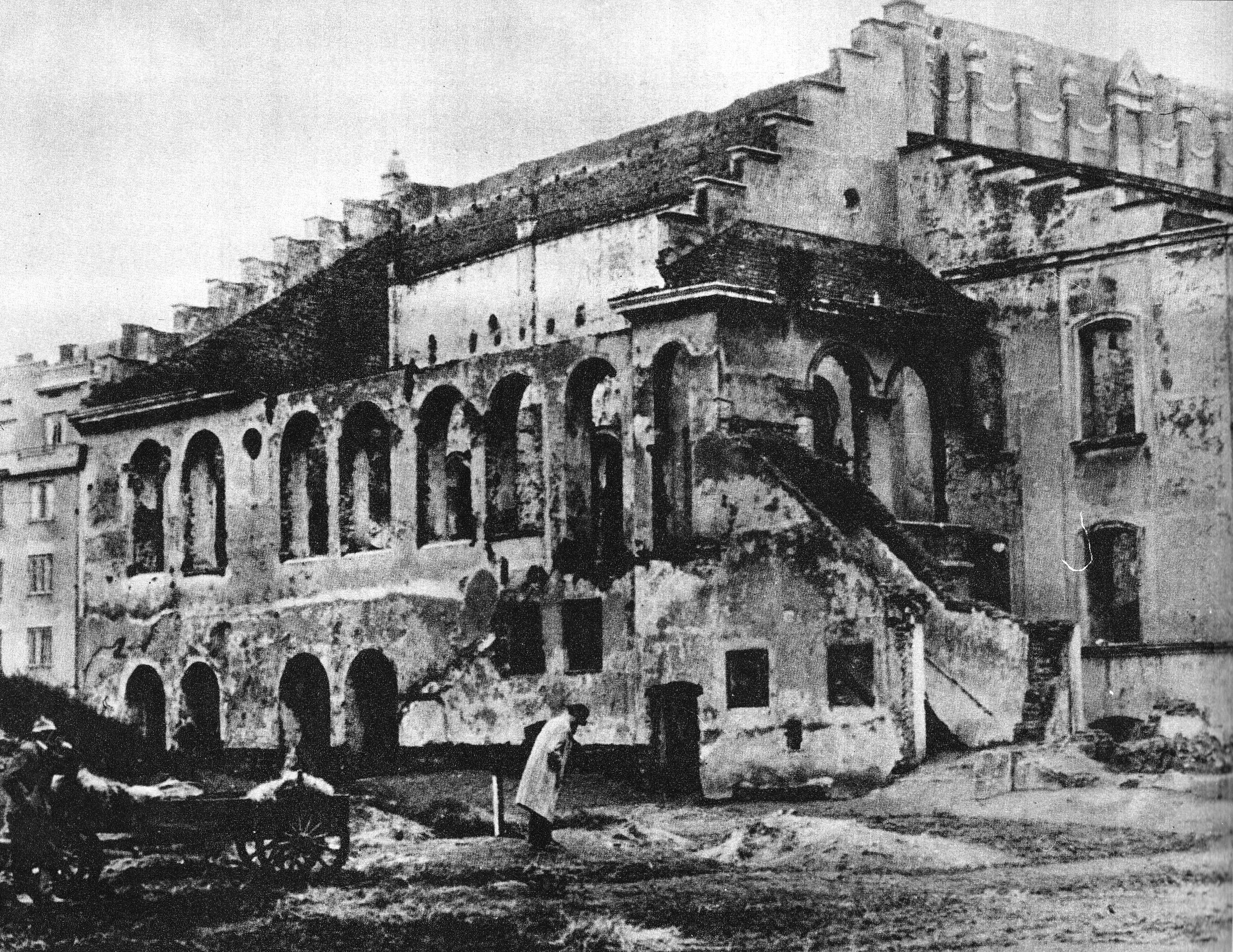 Zniszczona przez Niemców Stara Synagoga w Przemyślu